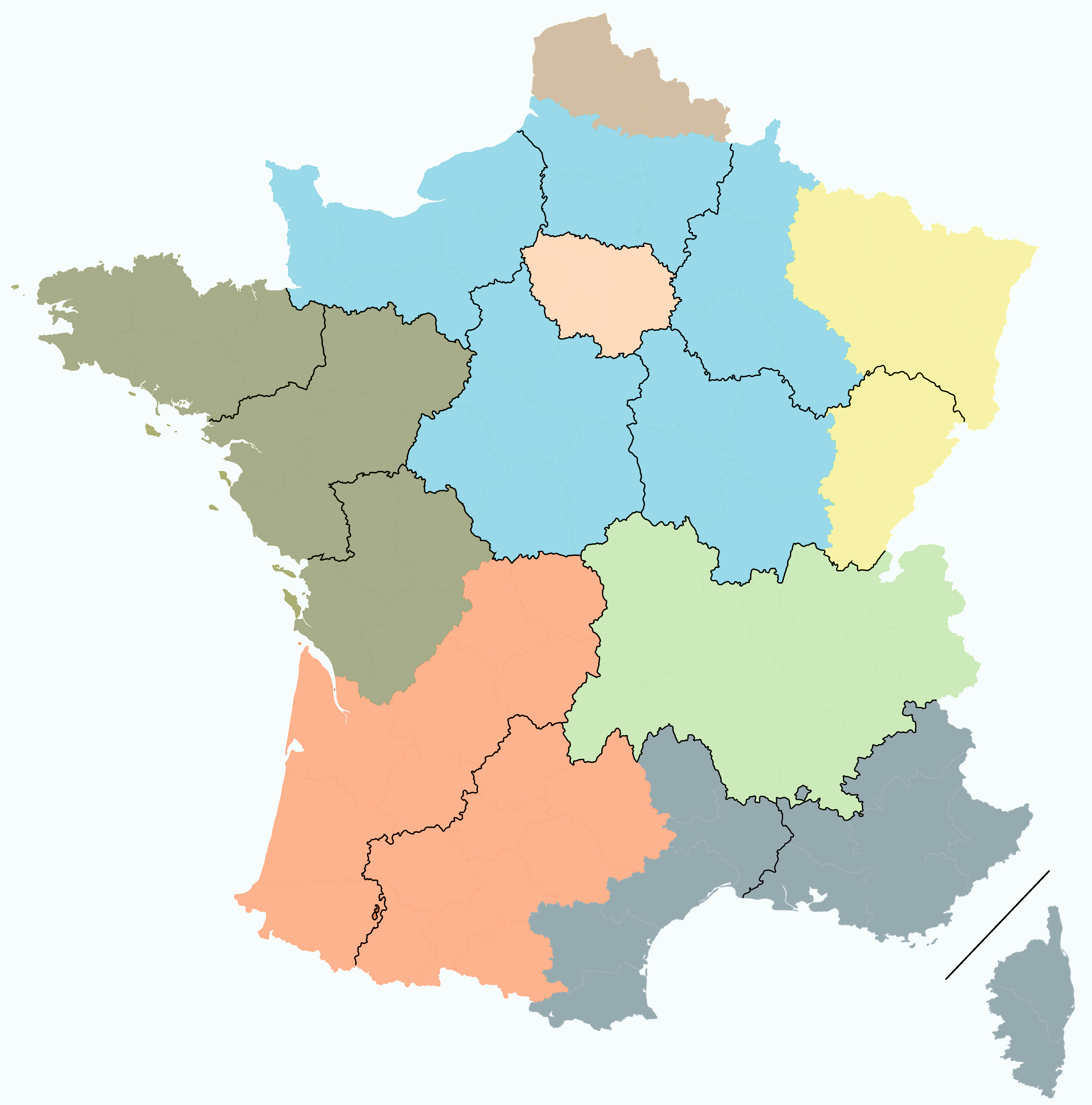 ZEAT de France métropolitaine avec les frontières des régions à partir de 2016 (réforme issue de l'acte III de la décentralisation). Travail personnel (Helio74100) Generé par